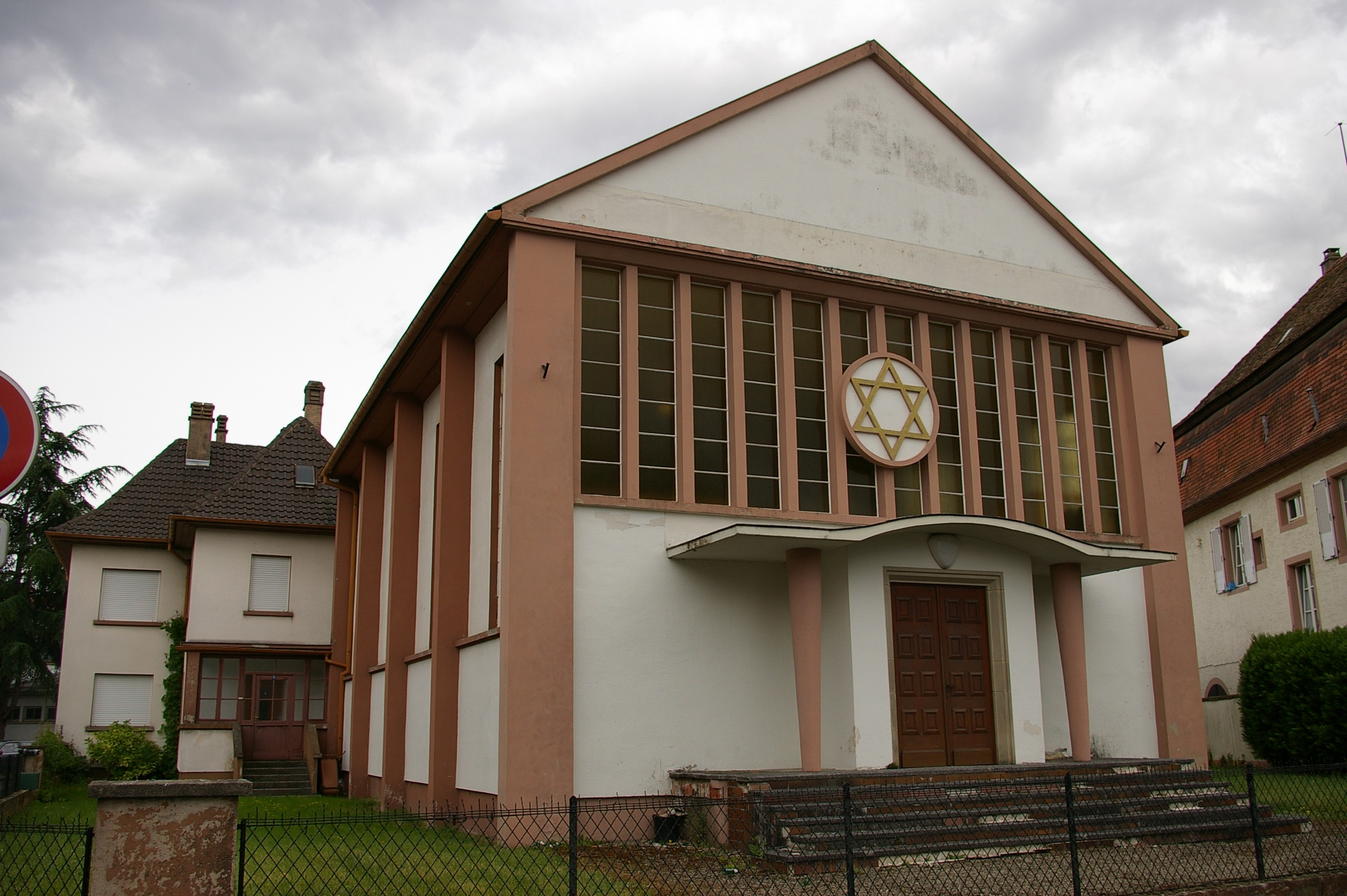 Synagogue de Wissembourg en 2007 - Le bâtiment a depuis été transformé pour abriter les archives de la ville.